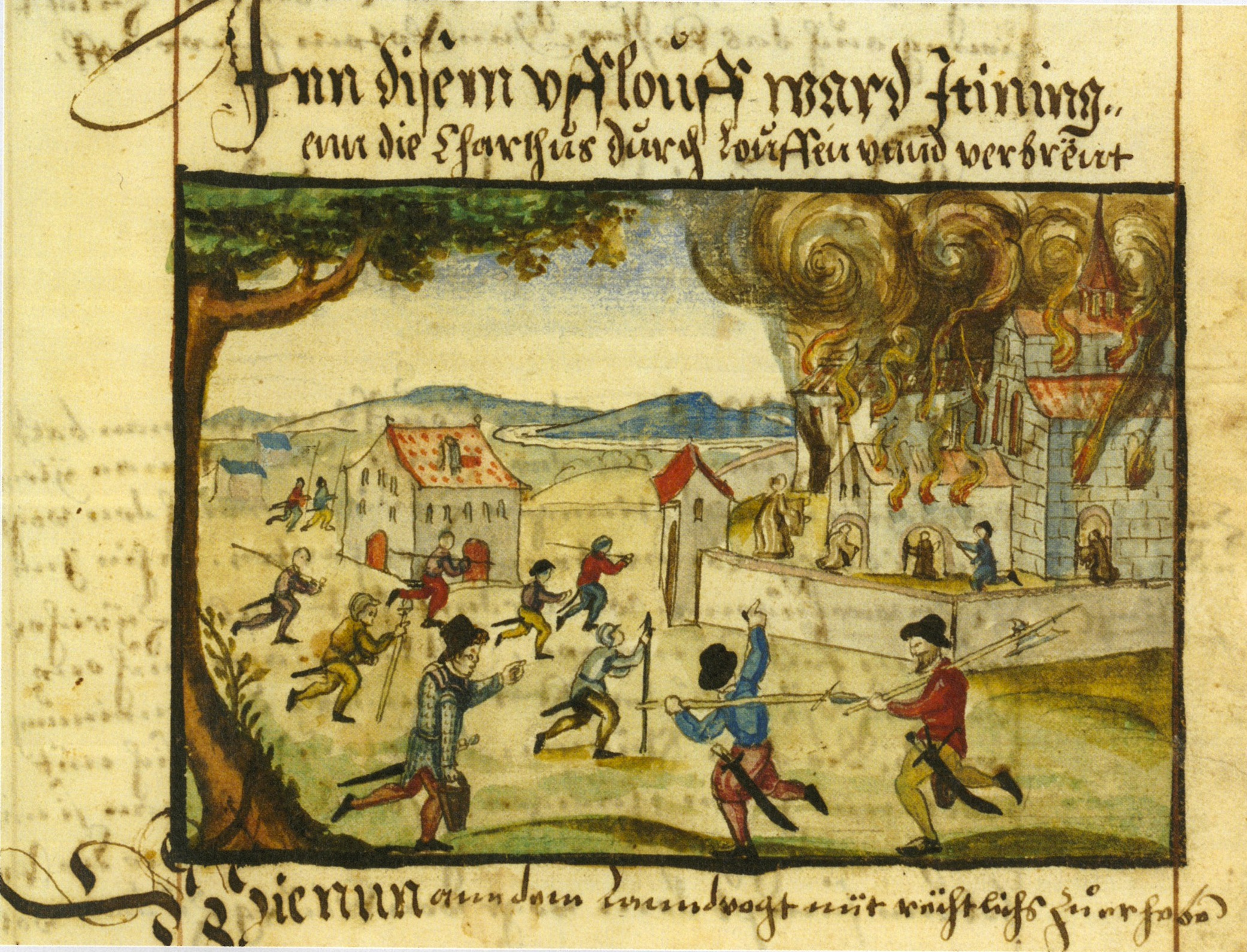 Ittinger Sturm: Miniatur von Heinrich Thomann, um 1605